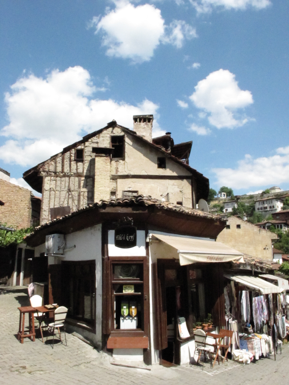 番紅花城鄂圖曼建築